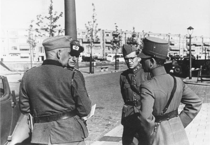 Holland. Deutsche und holländ[ische]. Offiziere in Rotterdam, 22.5.40